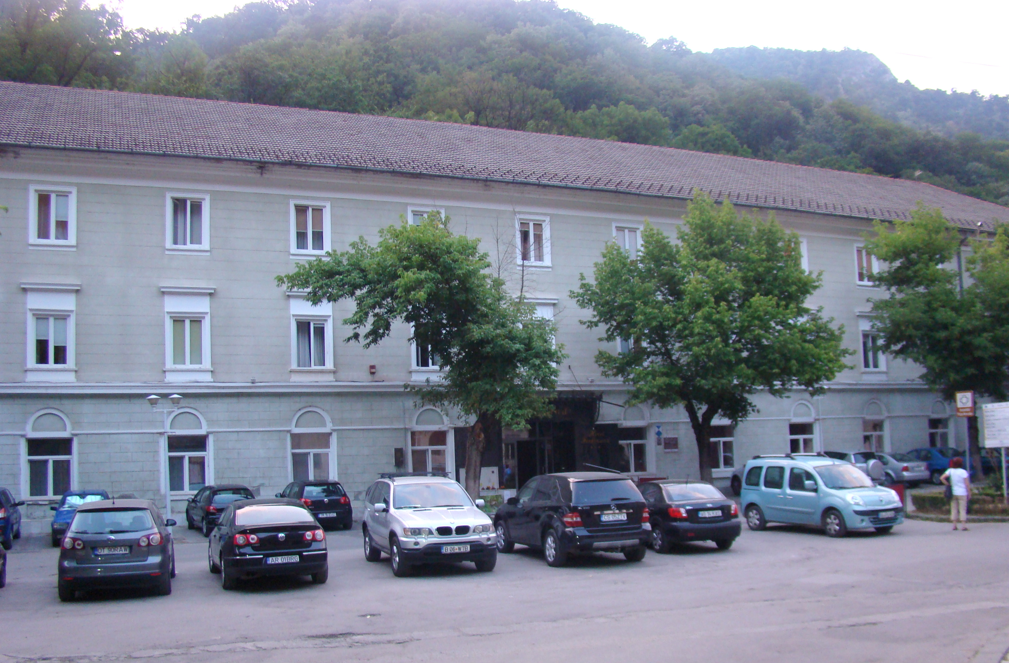 Fosta Administrație militară și cazarmă, fost Sanatoriu medical balnear, apoi Pavilionul 7, azi Hotel „Ferdinand”